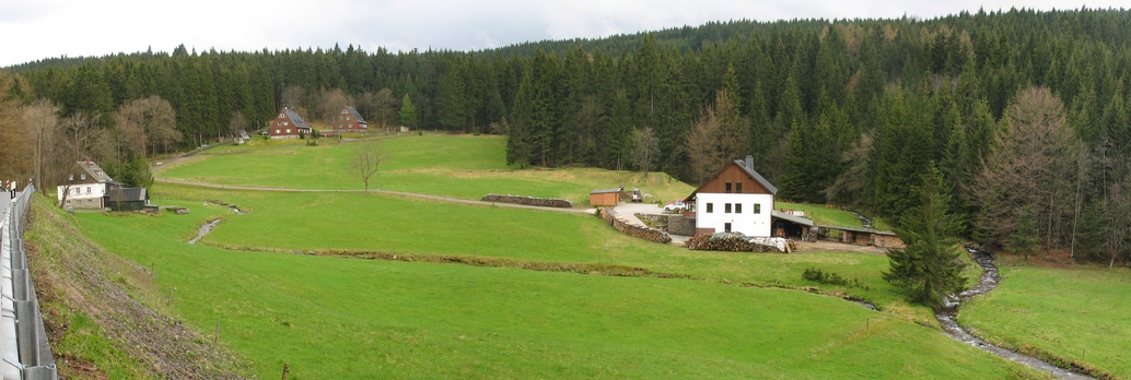 Zweibach